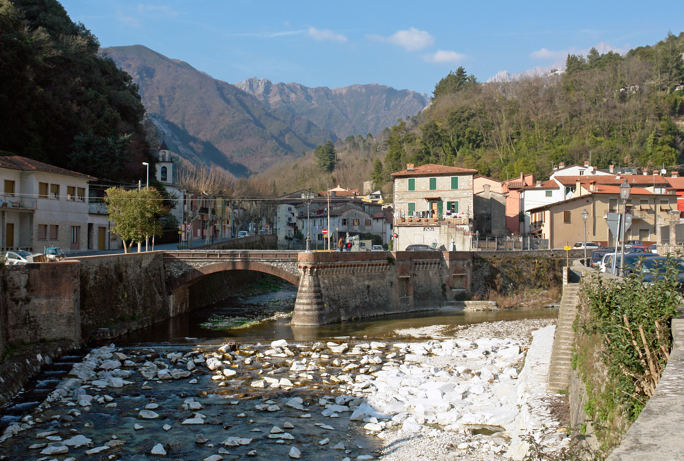 Seravezza, Am Fluss